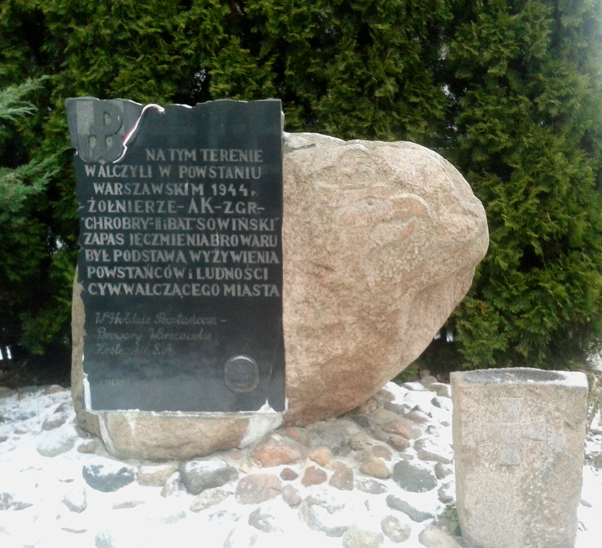 Głaz upamiętniający walki batalionów AK Chrobry II i Sowiński przy ul. Grzybowskiej w Warszawie. Tablica ustawiona na terenie Browarów Warszawskich, obecnie (2016) – parking.